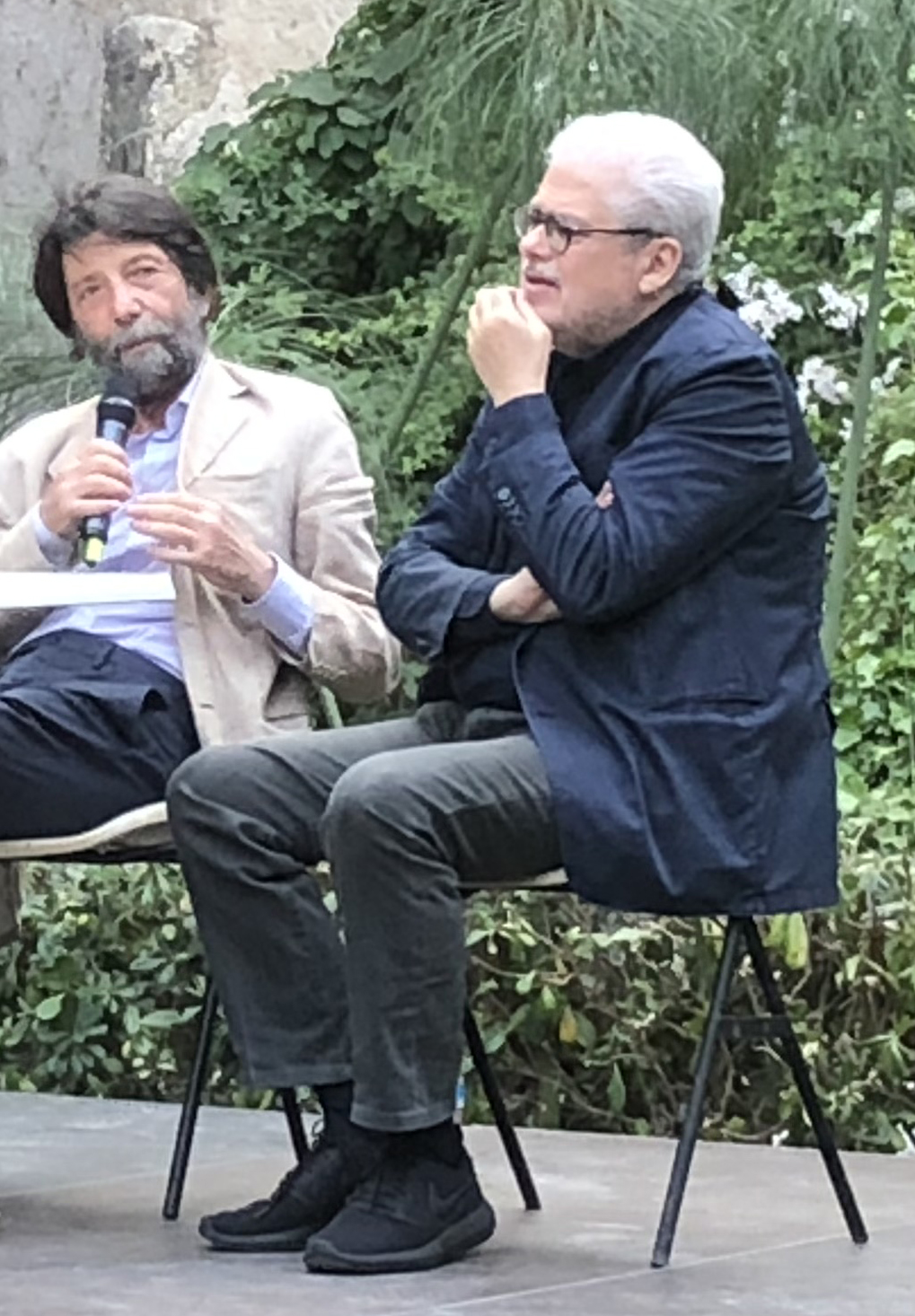 This file has been extracted from another file: Roberto Andò e Massimo Cacciari all'Orecchio di Dioniso.jpg